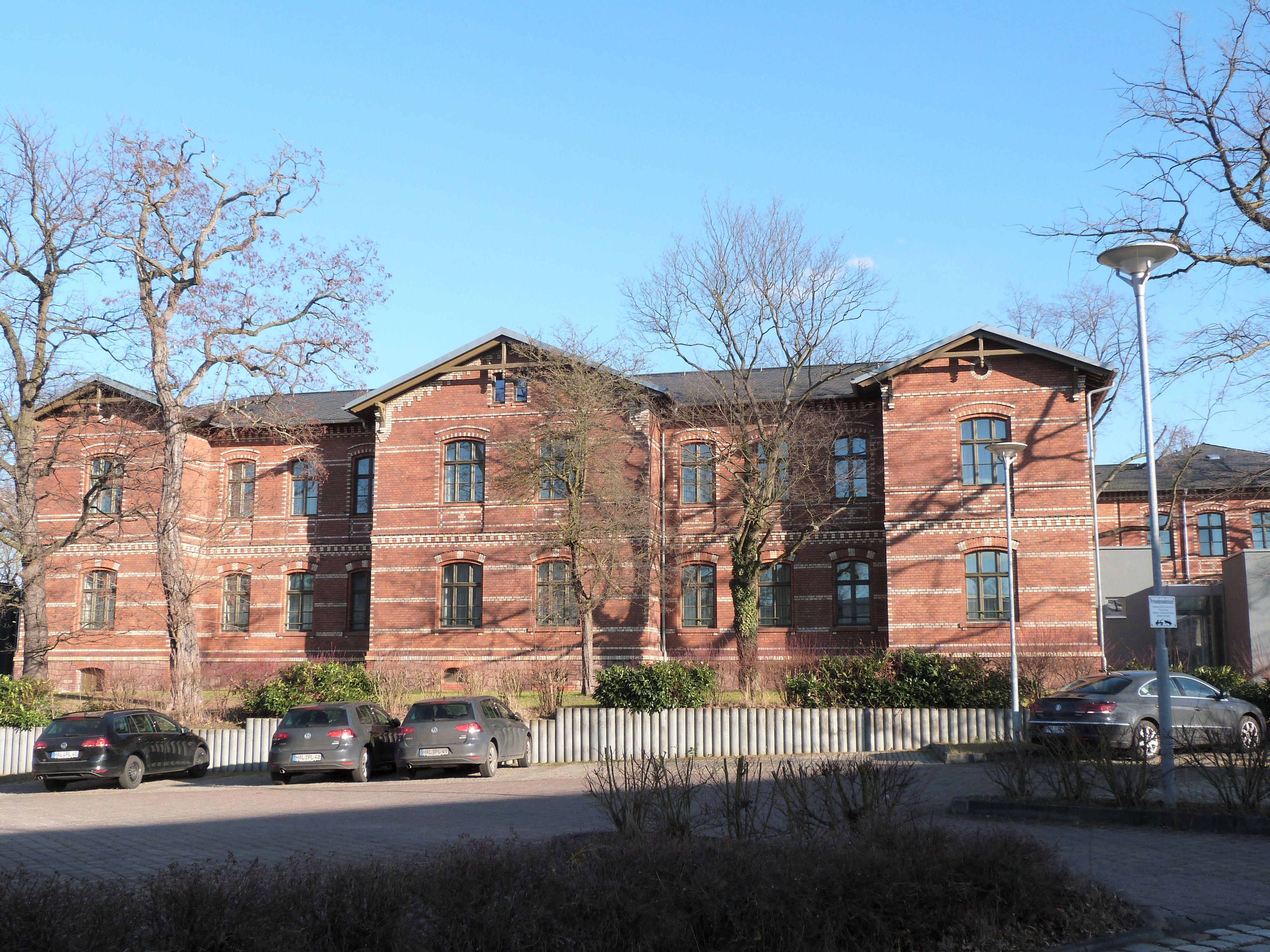 Ehemalige Häuser 207, 210 und 211 der Provinzial-Irrenanstalt Nietleben, seit 2013 Boardinghaus Weinberg Campus (Gästehaus für Wissenschaftler), Daniel-Vorländer-Straße 1, Halle (Saale)